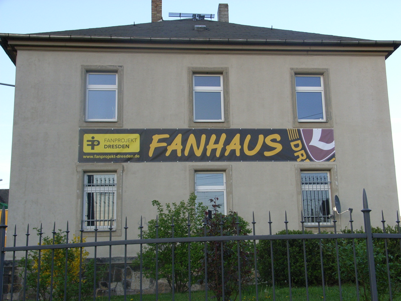 Das Dynamo-Fanhaus in der Löbtauer Str. 17 (ehemals DRK-Gebäude)